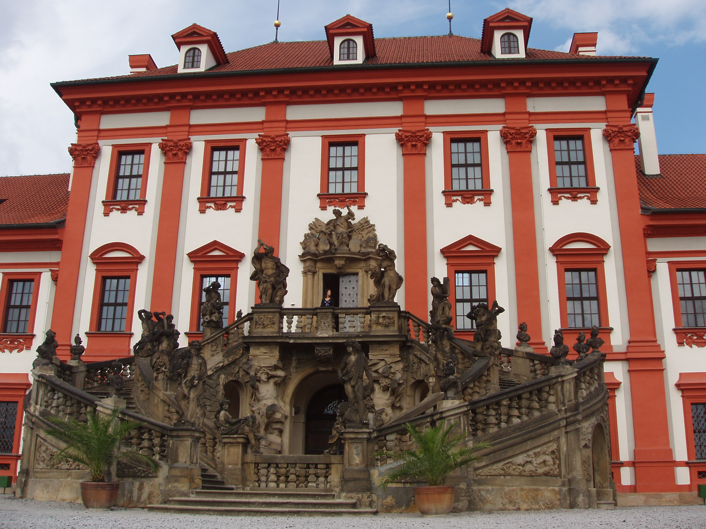 Zámok Trója, Praha (vchod zo zámockej záhrady)